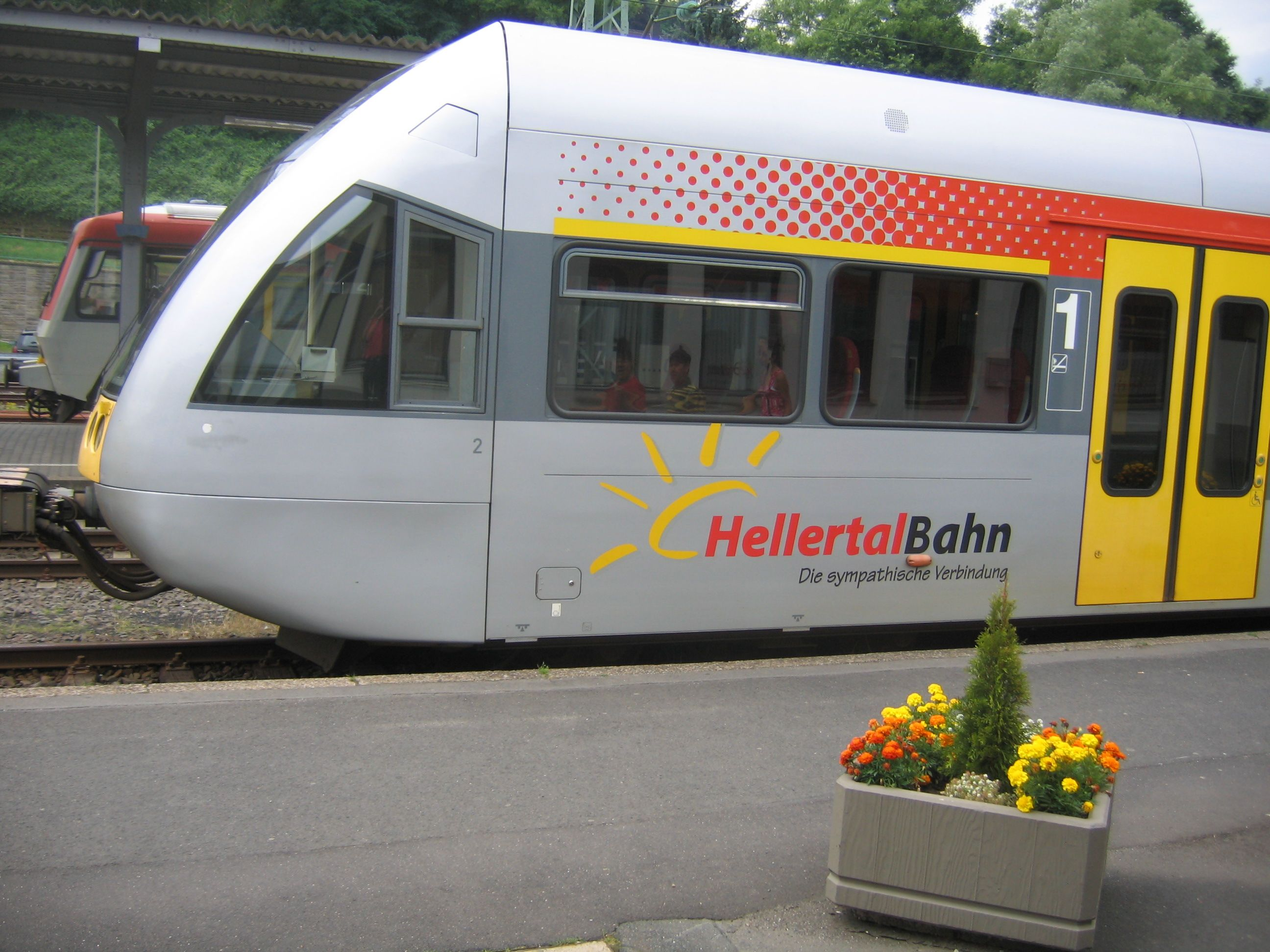 Firmenlogo der Hellertalbahn GmbH an einem Gelenktriebwagen vom Typ Stadler GTW im Bahnhof Betzdorf/Stadler GTW 2/6